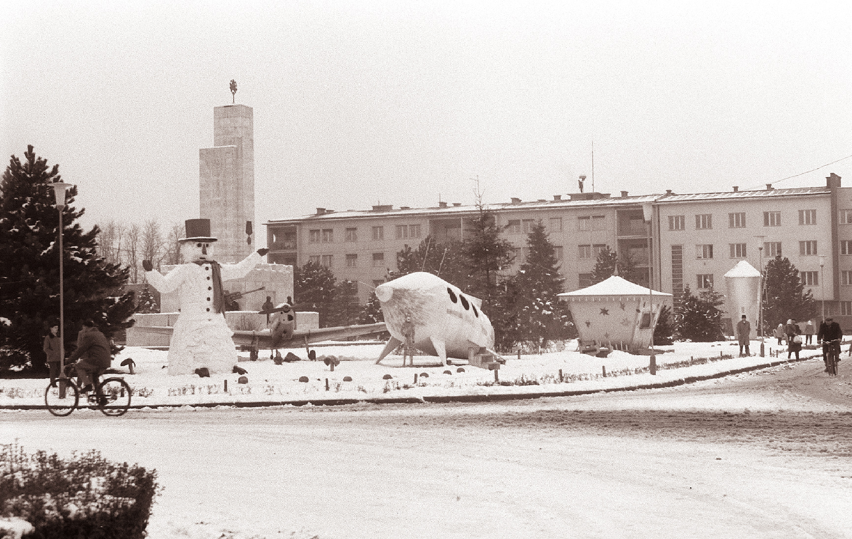 Snežak v Murski Soboti